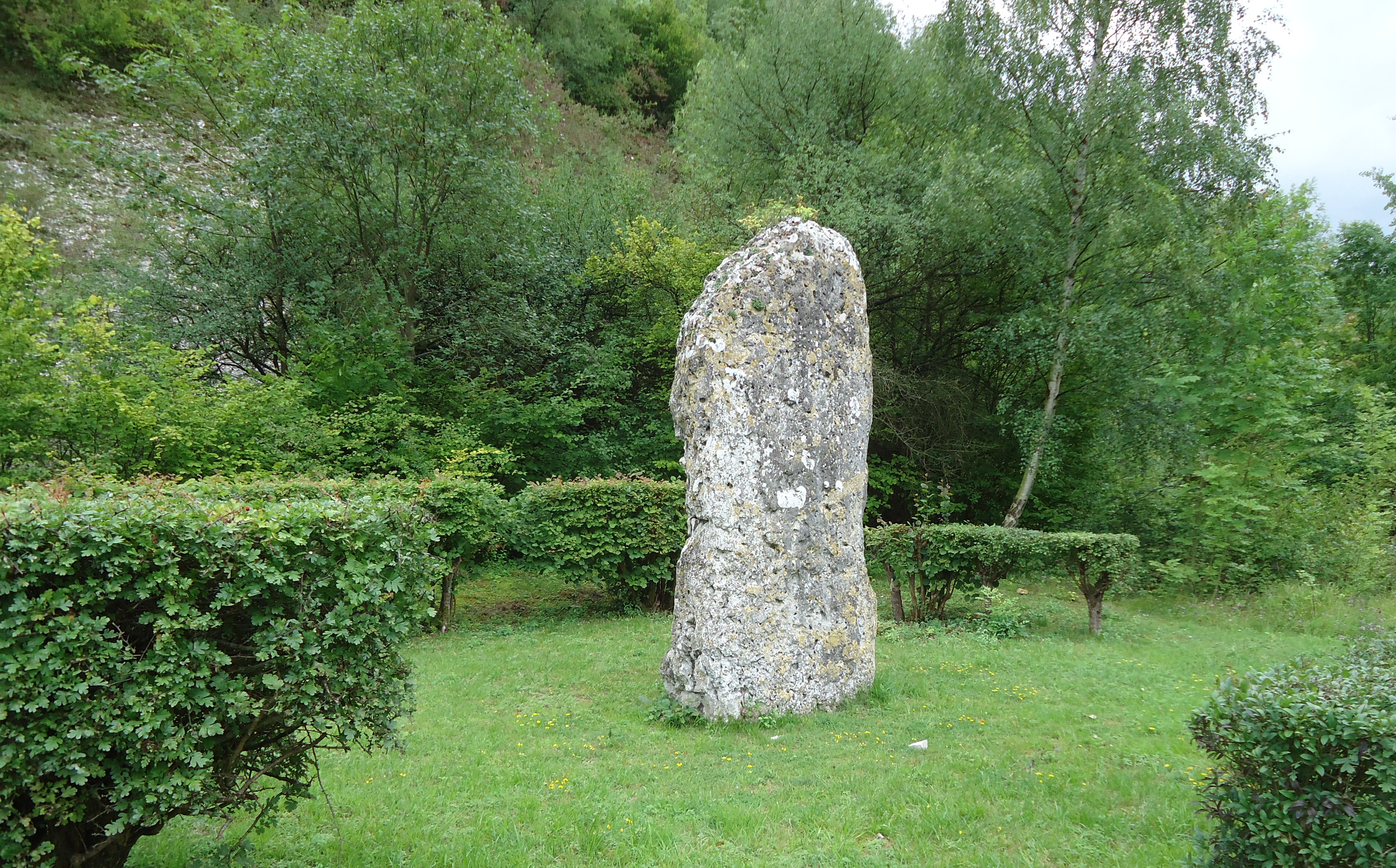 Val de Reuil - Menhir de la Basse Crémonville